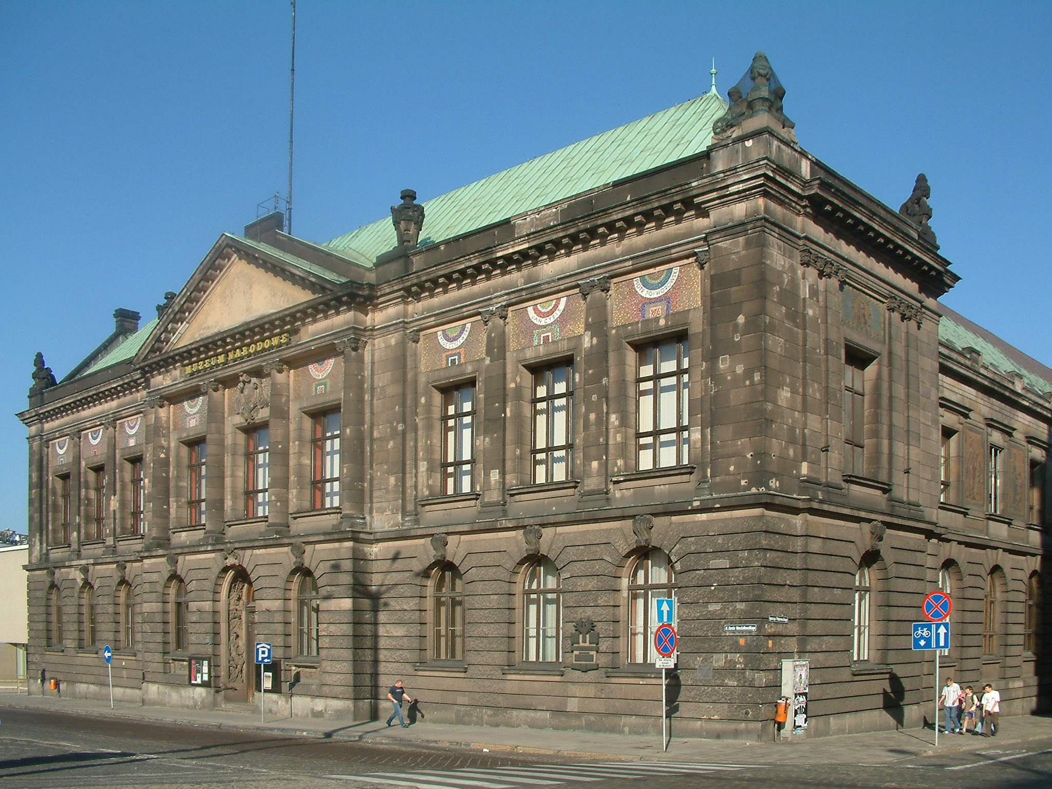 National Museum, Gallery of painting and sculpture in Poznań, Poland